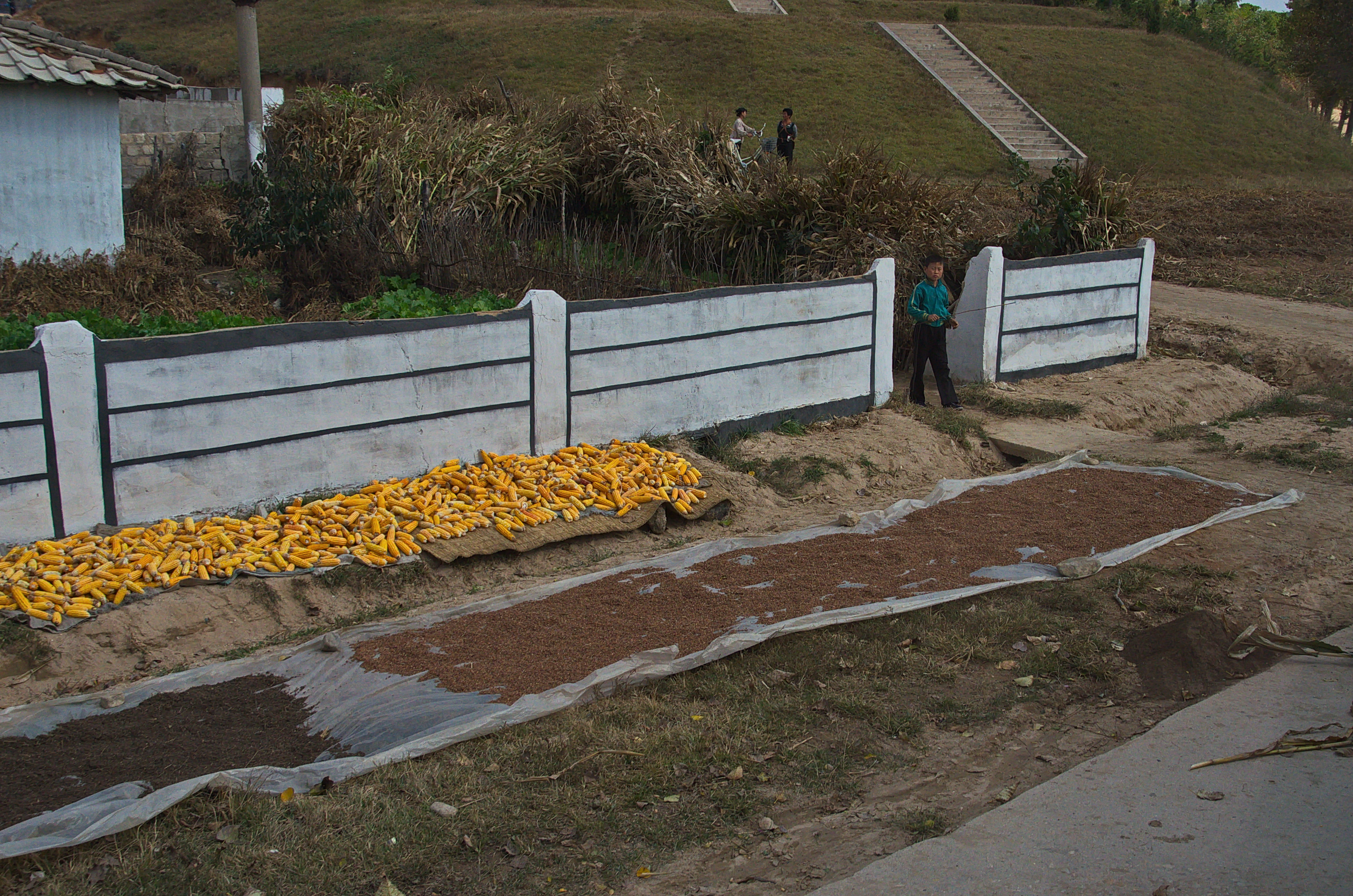 Nordkorea 2015 - von Nampo nach Käsong